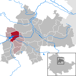 Straußfurt in Thuringia - District Sömmerda